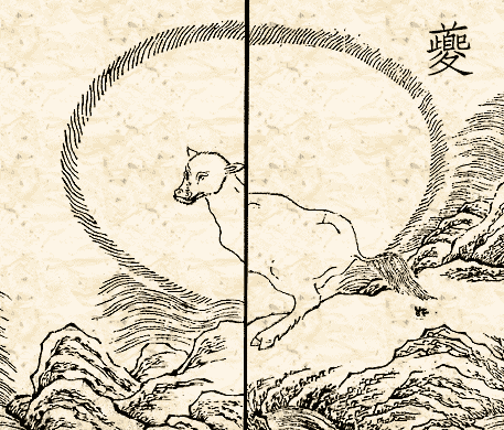 Куй. Рисунок із Шань хай цзін («Канон гір і морів»)